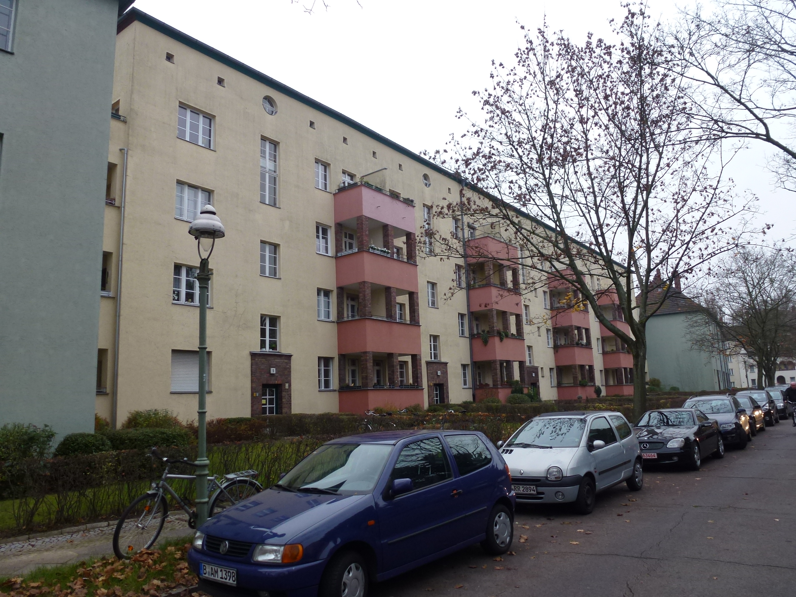 Berlin-Tempelhof Mohnickesteig